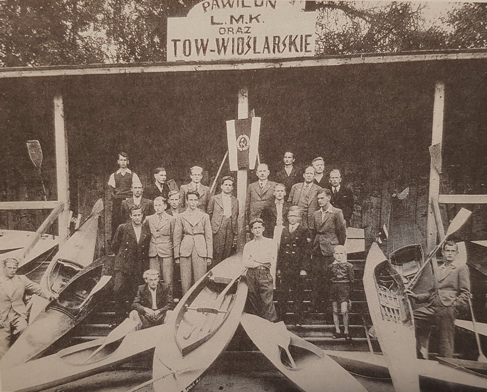 Towarzystwo Wioślarskie w Nowym Sączu - przystań